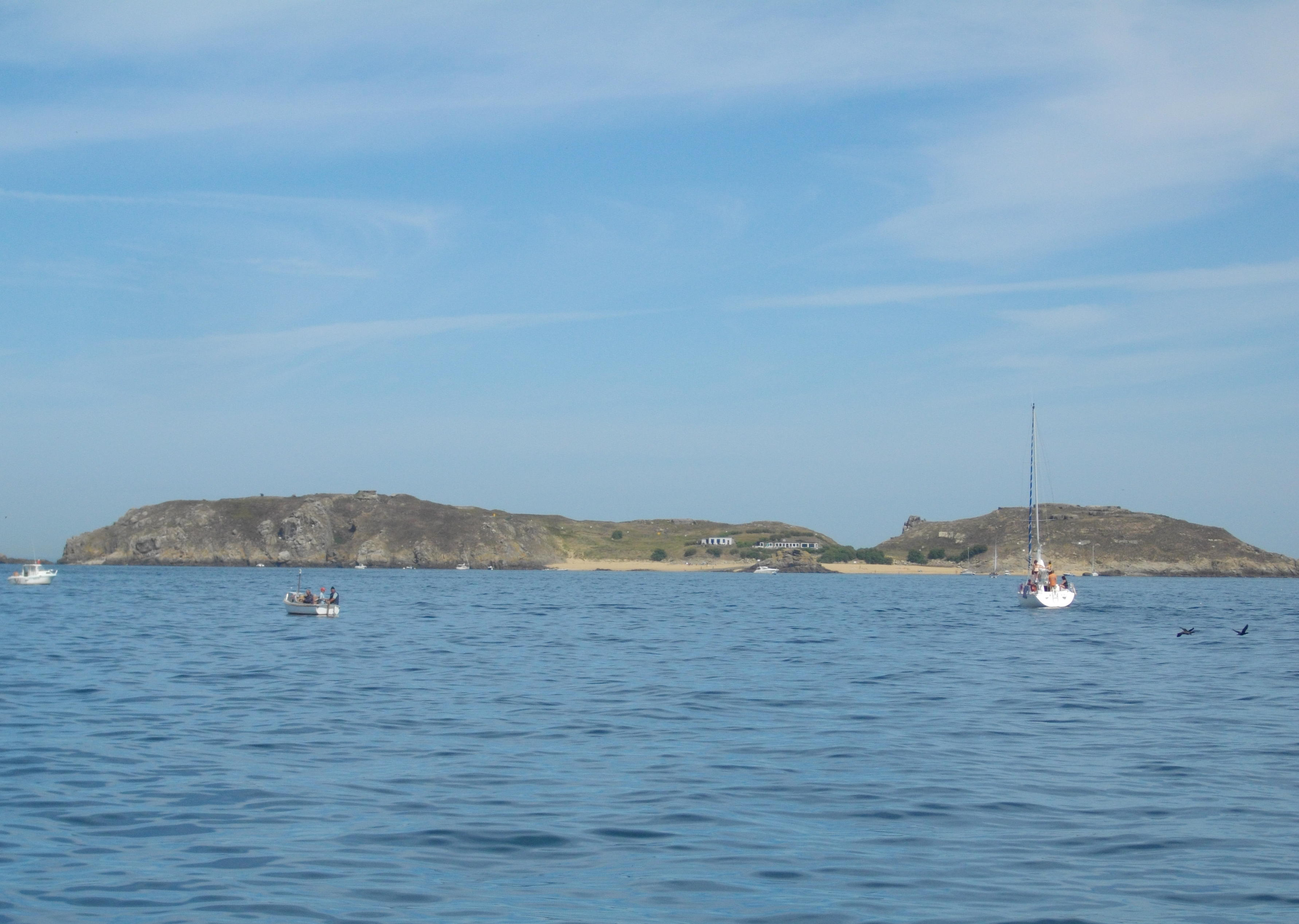 "Île de Cézembre" : face au port de Saint-Malo (Ille-et-Vilaine). Place sud vue du bateau-navette.